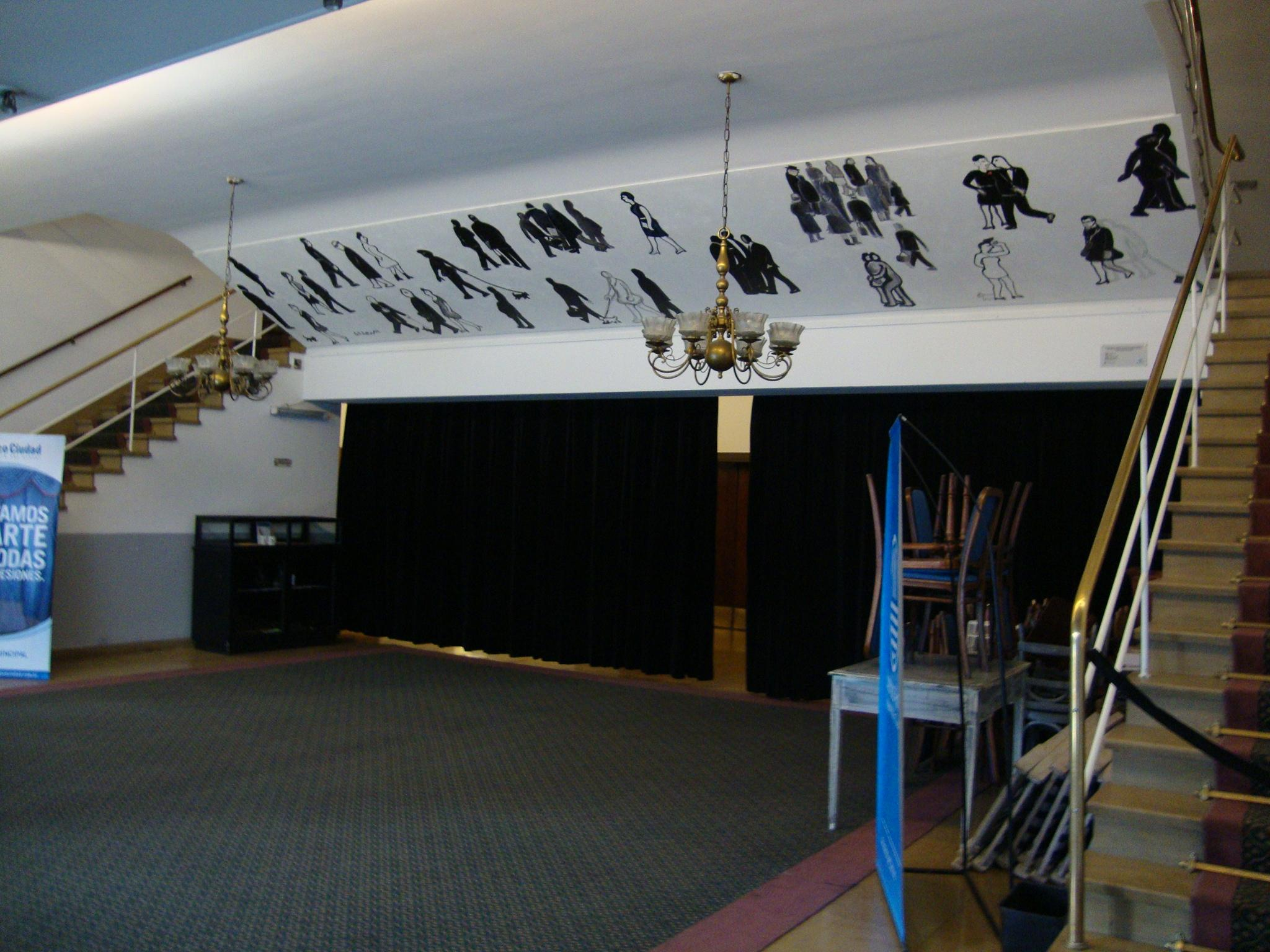 Vista parcial del foyer del Teatro Presidente Alvear, en Avenida Corrientes 1659. Buenos Aires, Argentina.